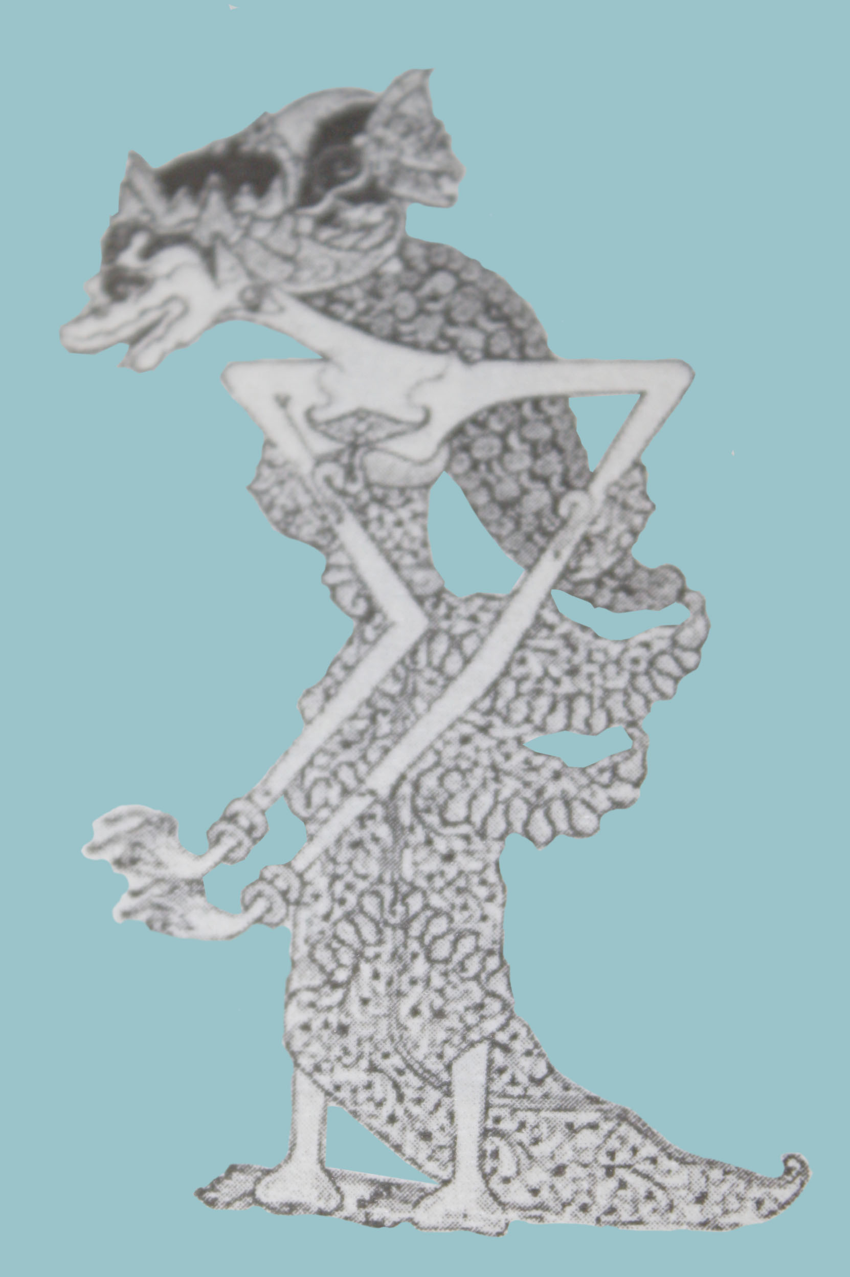 Tokoh paraga wayang Anjani